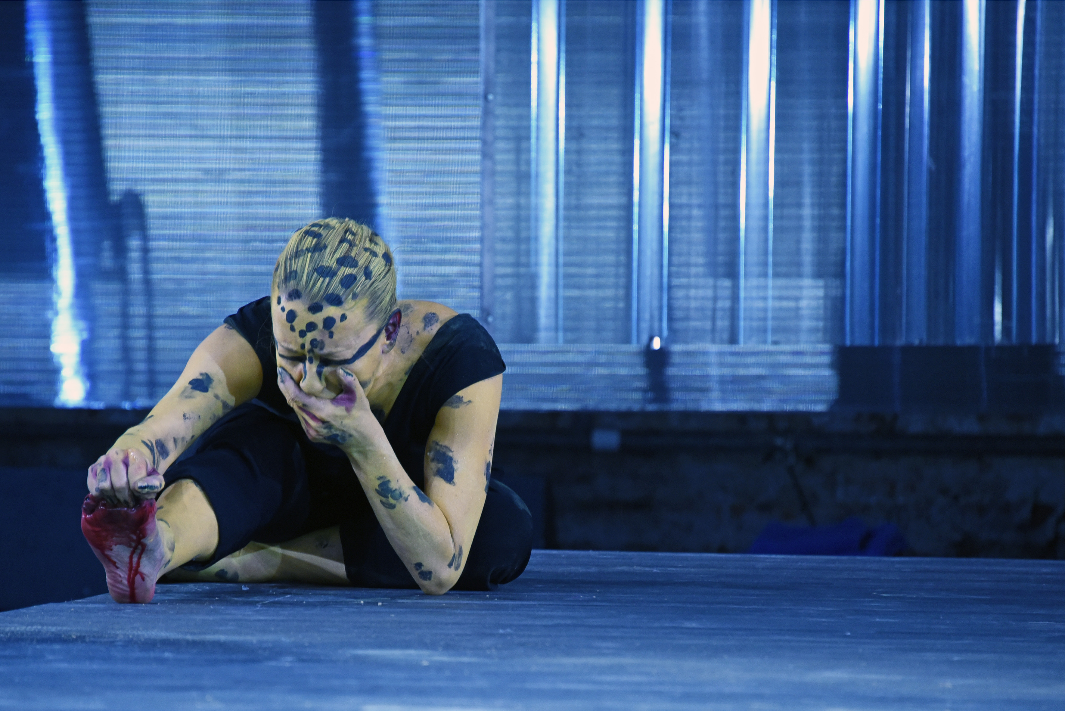 Theaterstück Das Reich der Tiere. Akademietheater Wien